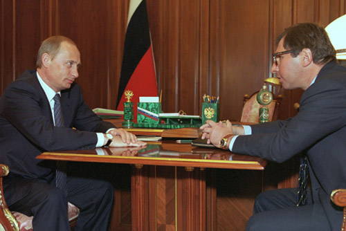 МОСКВА, КРЕМЛЬ. С президентом «Альфа-банка» Петром Авеном.